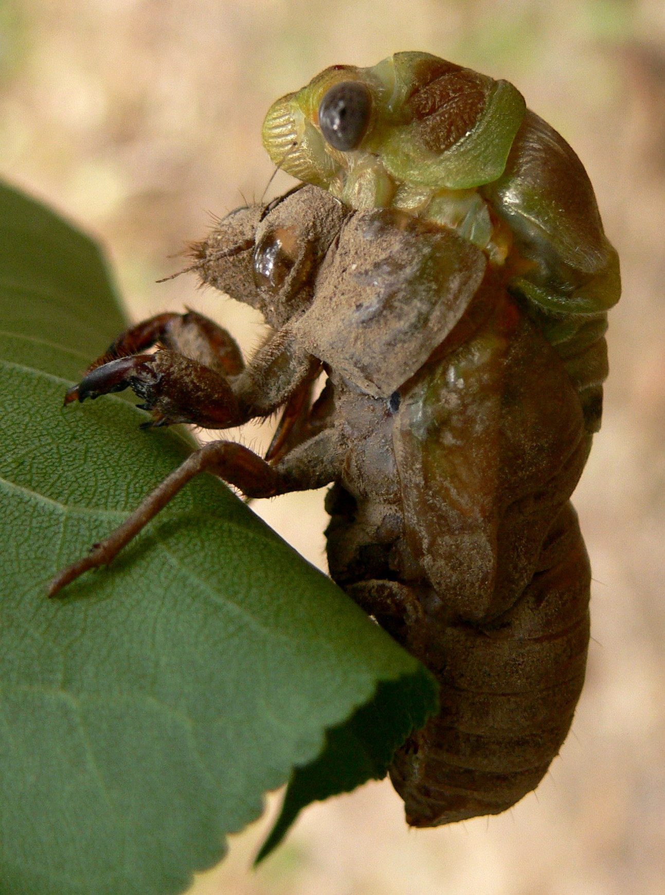 Cigale plébéienne quittant sa mue